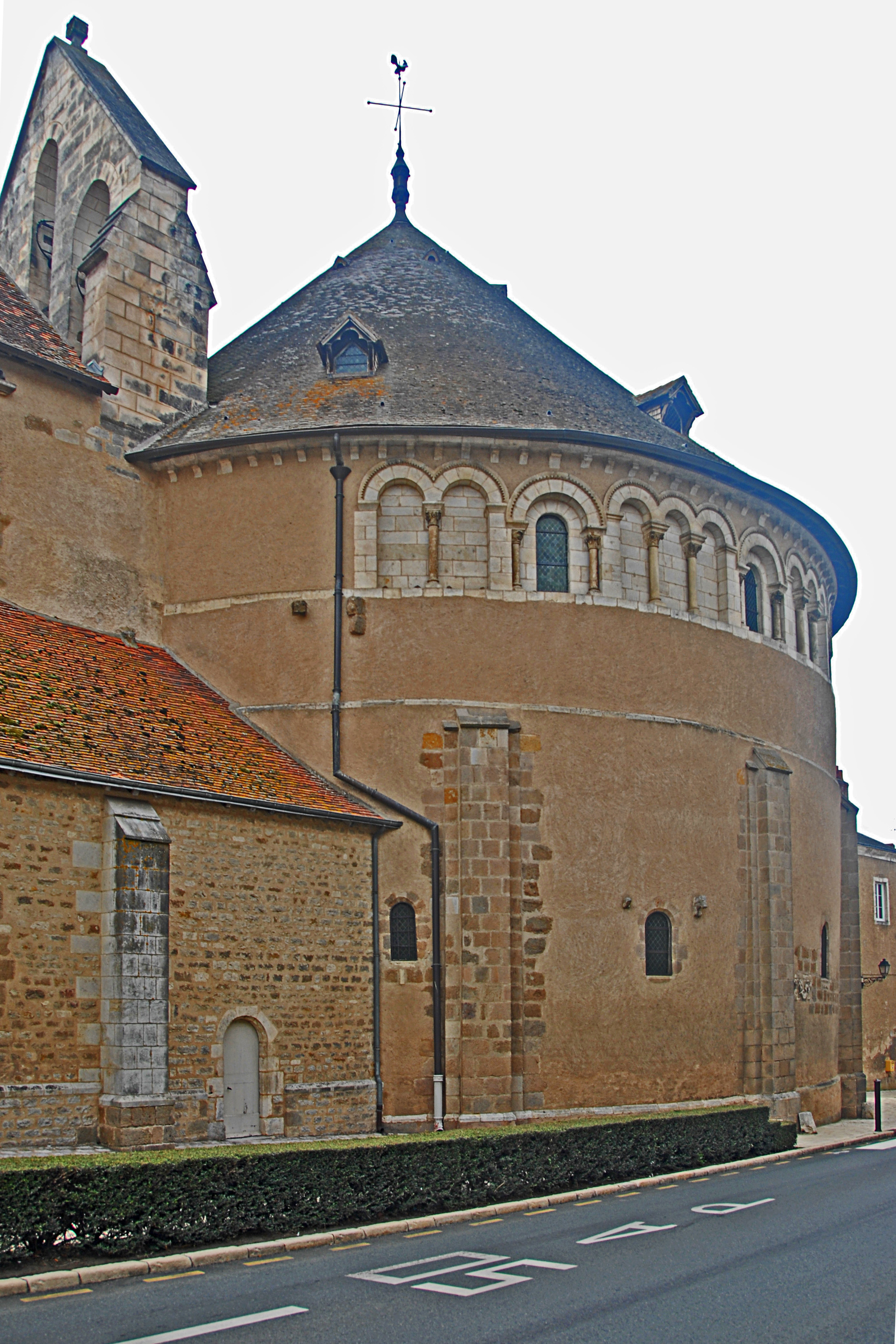 Neuvy_St.-Sépulcre, Rotunde von SO